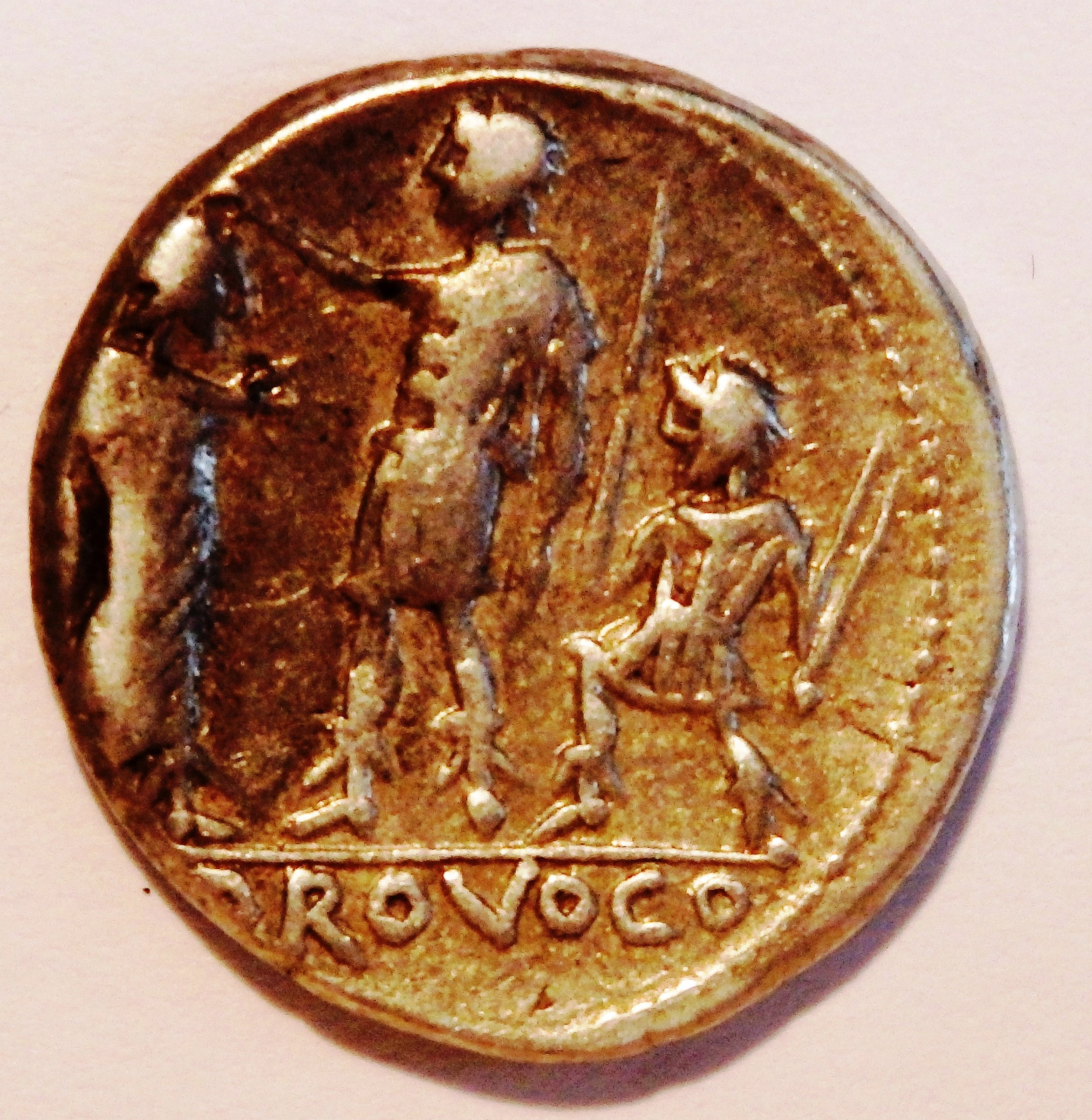 Provoco-Szene auf Denar der Römischen Republik, ca. 110/9 v. Chr., Albert Nr. 1092